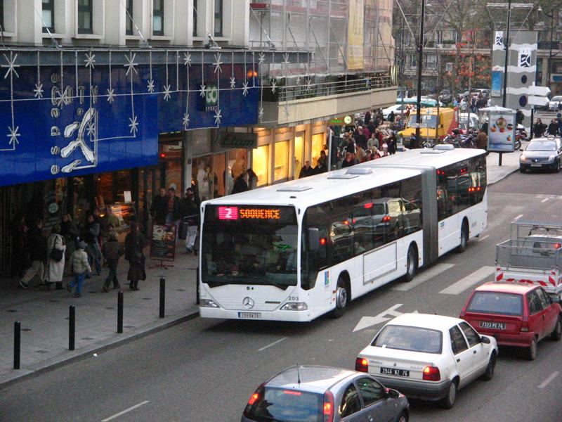 Bus de la CTPO devant le centre-commercial Coty